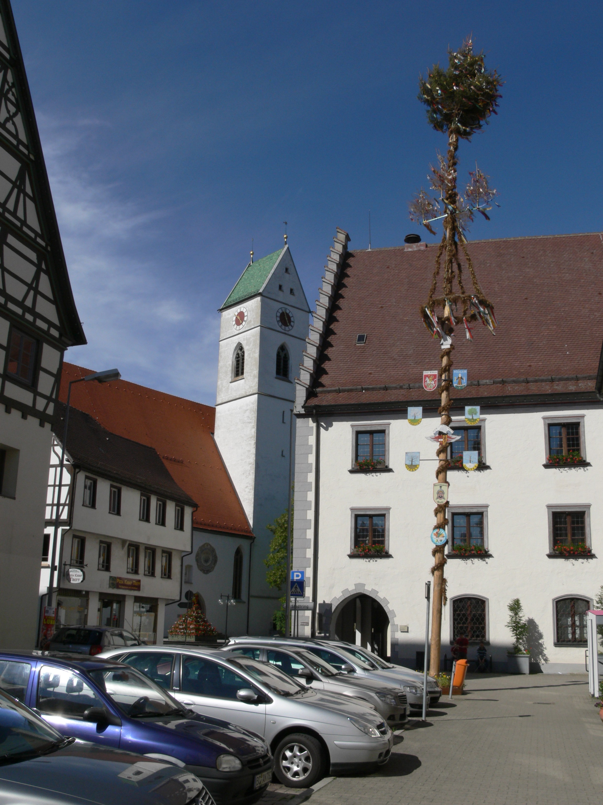 Maibaum vor dem Rathaus in Riedlingen.